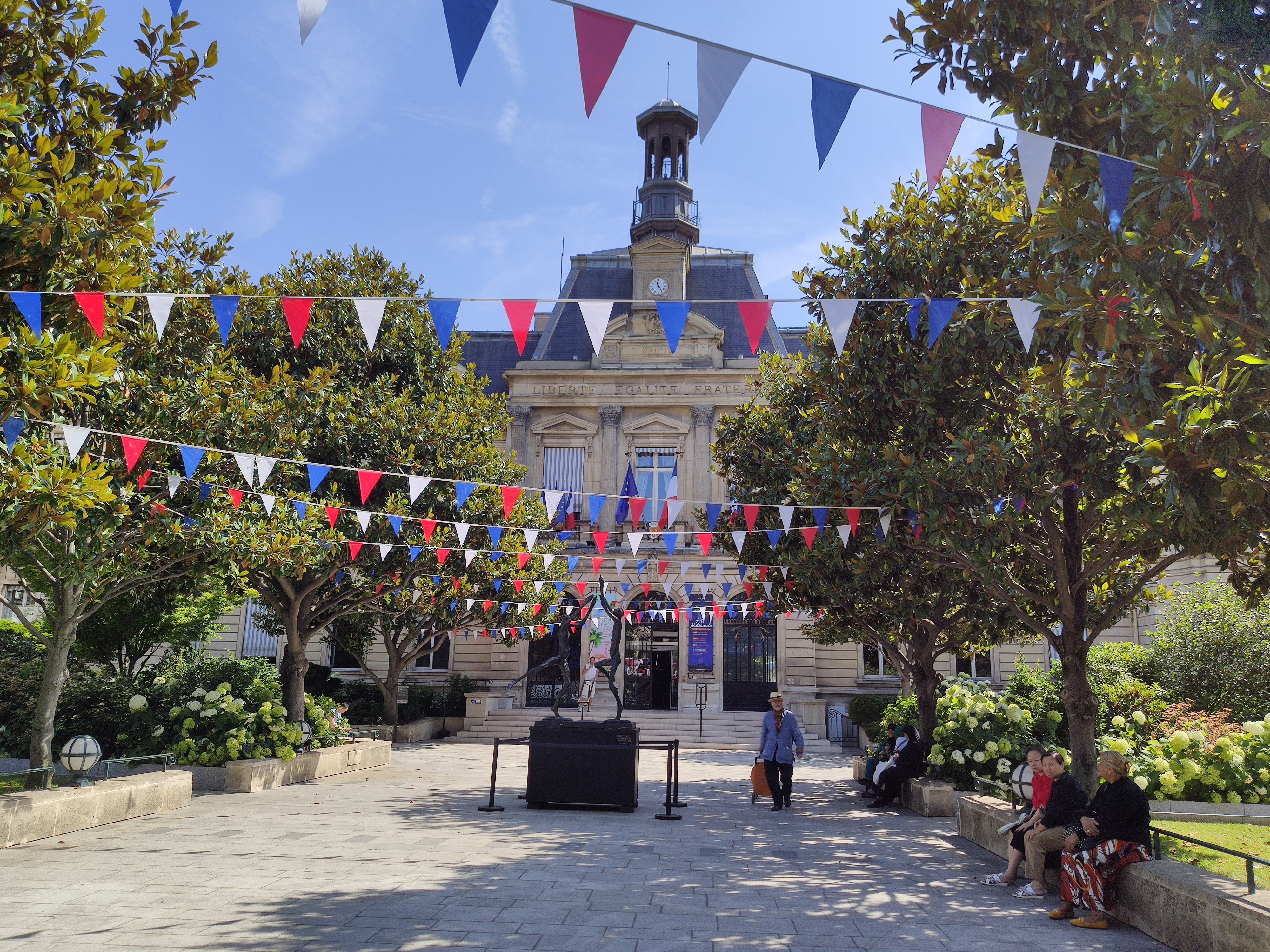 Hôtel-de-Ville de Clichy : Pavoisement du 14 juillet 2019